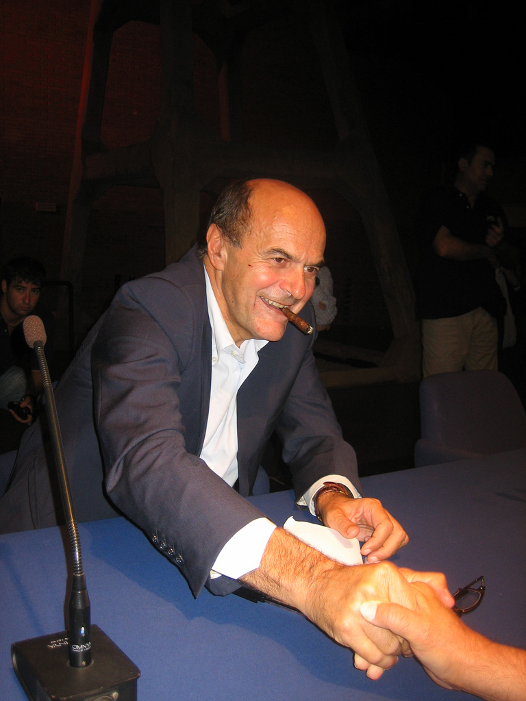 Pierluigi Bersani stringe la mano ad un partecipante della festa